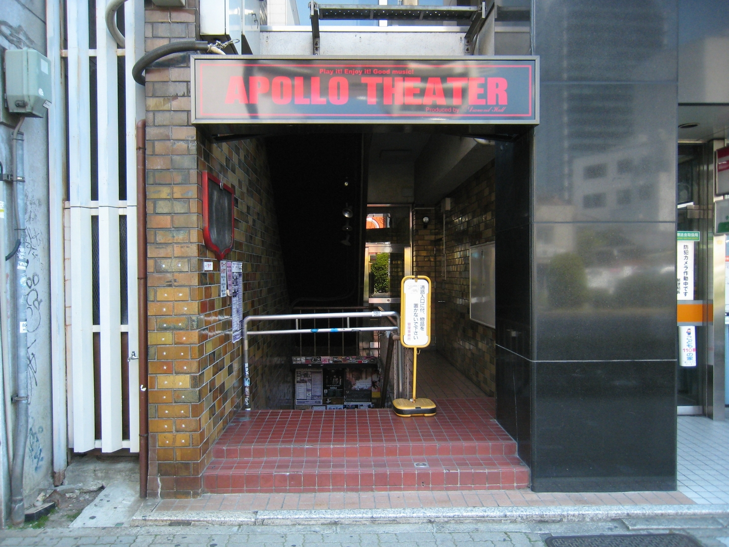 雲竜フレックスビル東館 アポロシアター入口前